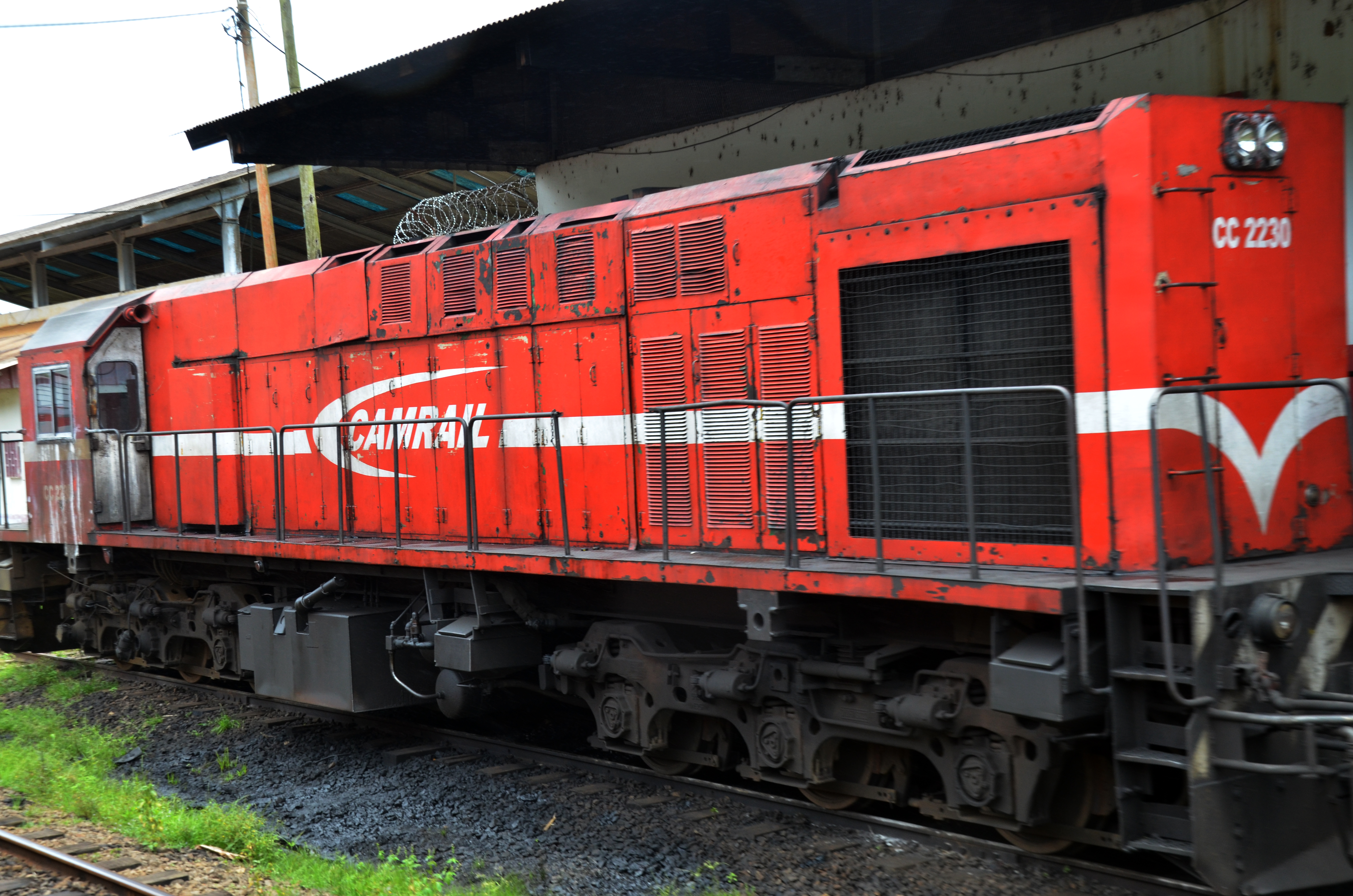 La locomotive Bombardier CC2230 de la société de chemin de fer du Cameroun This is an image with the theme "Africa on the Move or Transport" from: Cameroon